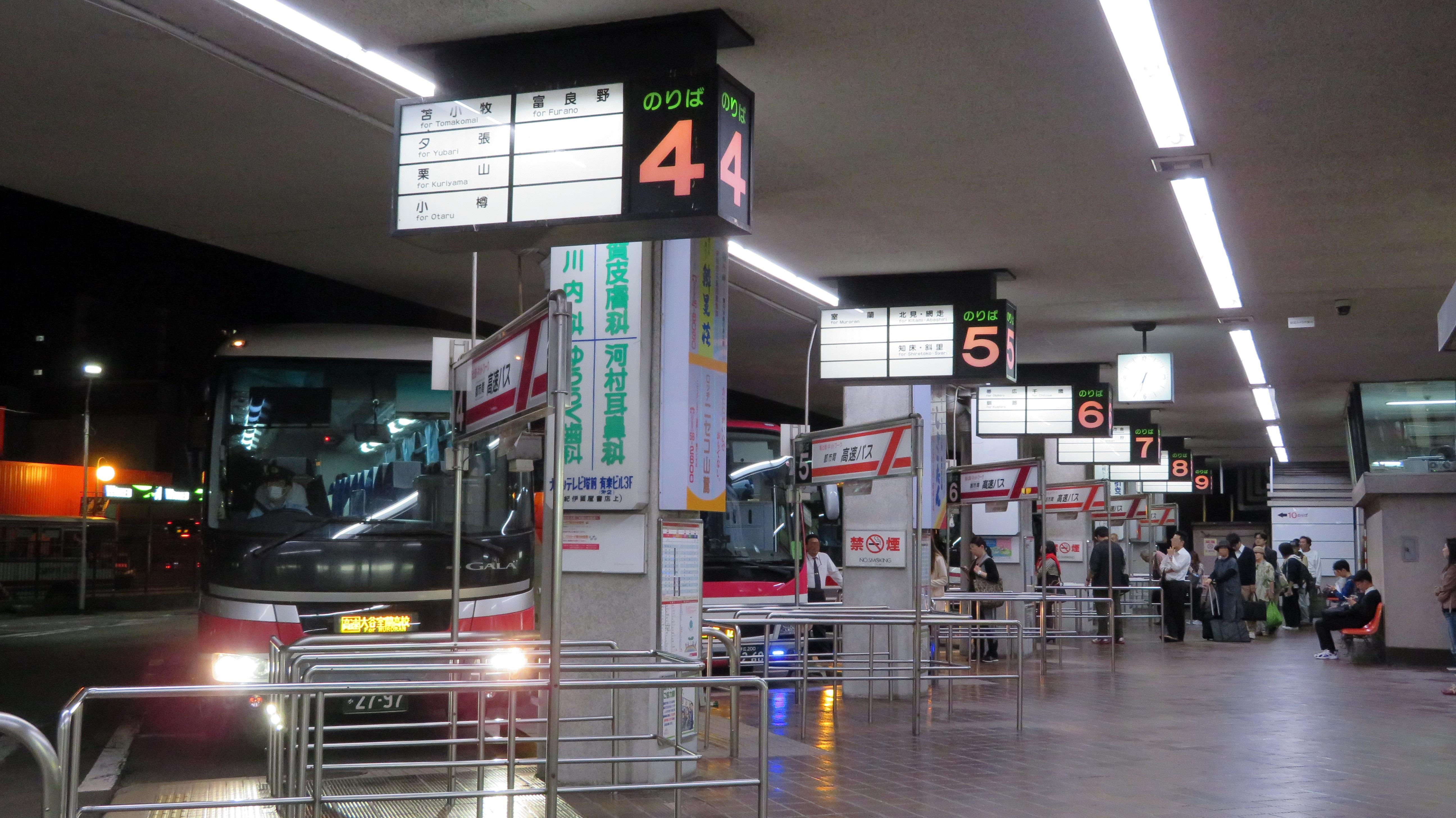 札幌ターミナルのりば Canon PowerShot SX720 HS